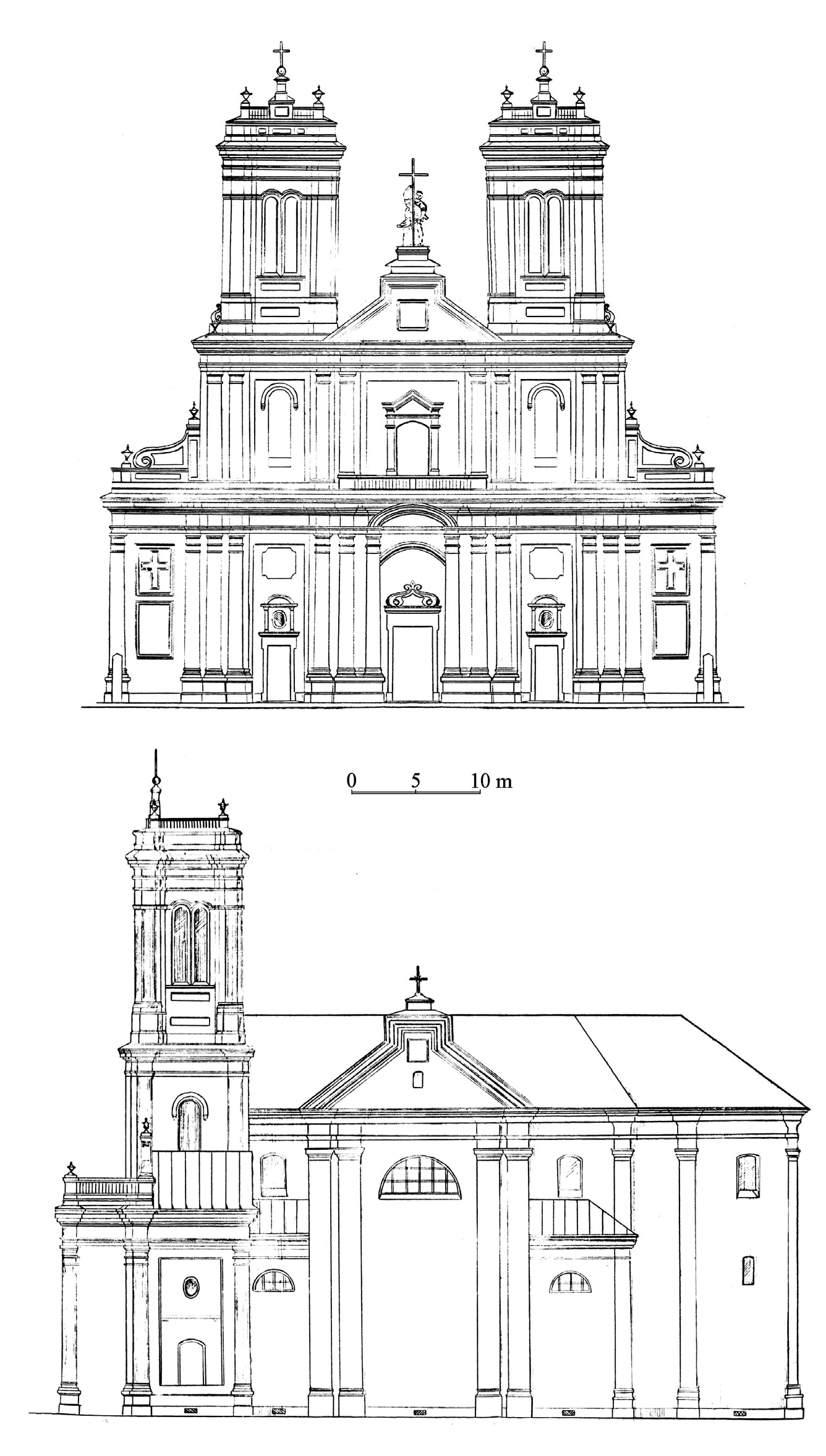 Беларуская (тарашкевіца): Бялынічы (Białyničy). Касьцёл Унебаўзяцьця Найсьвяцейшай Панны Марыі пры кляштары кармэлітаў. Праект рэканструкцыі